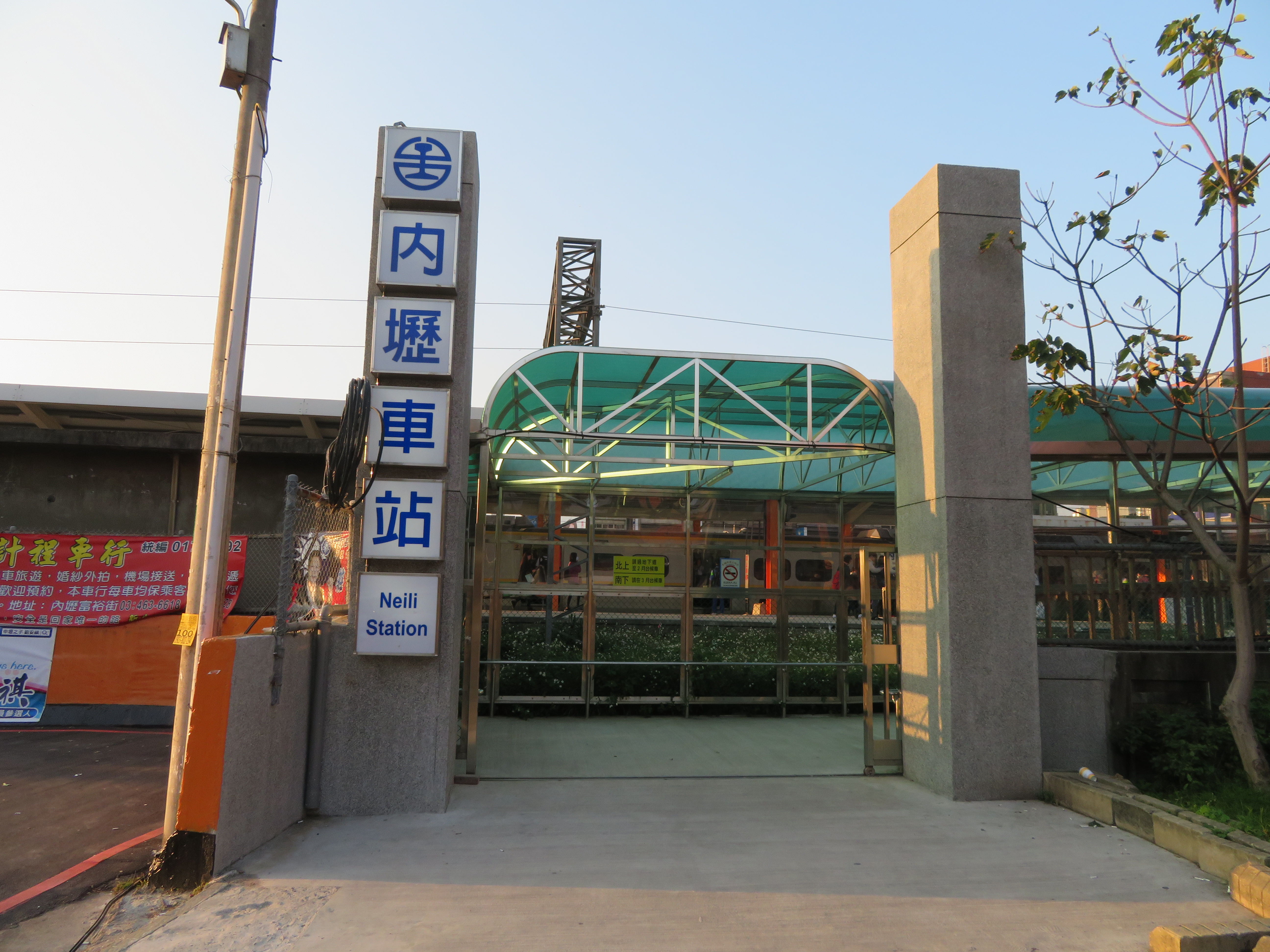 內壢車站後站簡易出口。